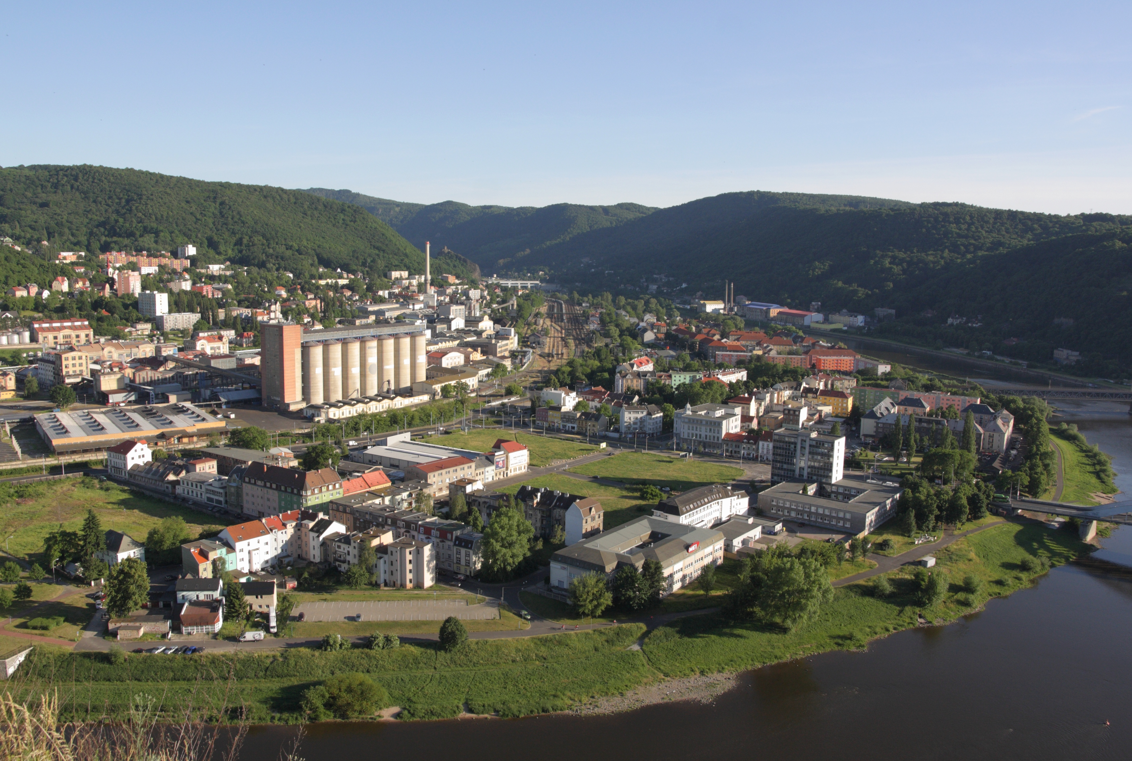 Ústí nad Labem - Střekov, pohled z Mariánského vrchu